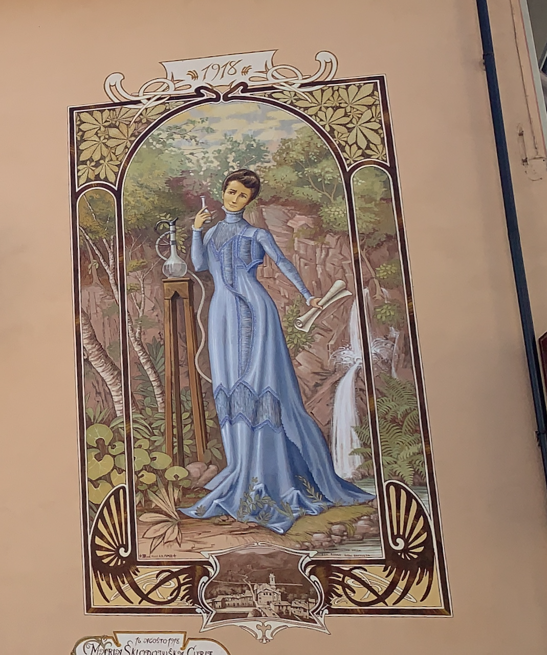 Affresco di Madame Curie a Lurisia Terme